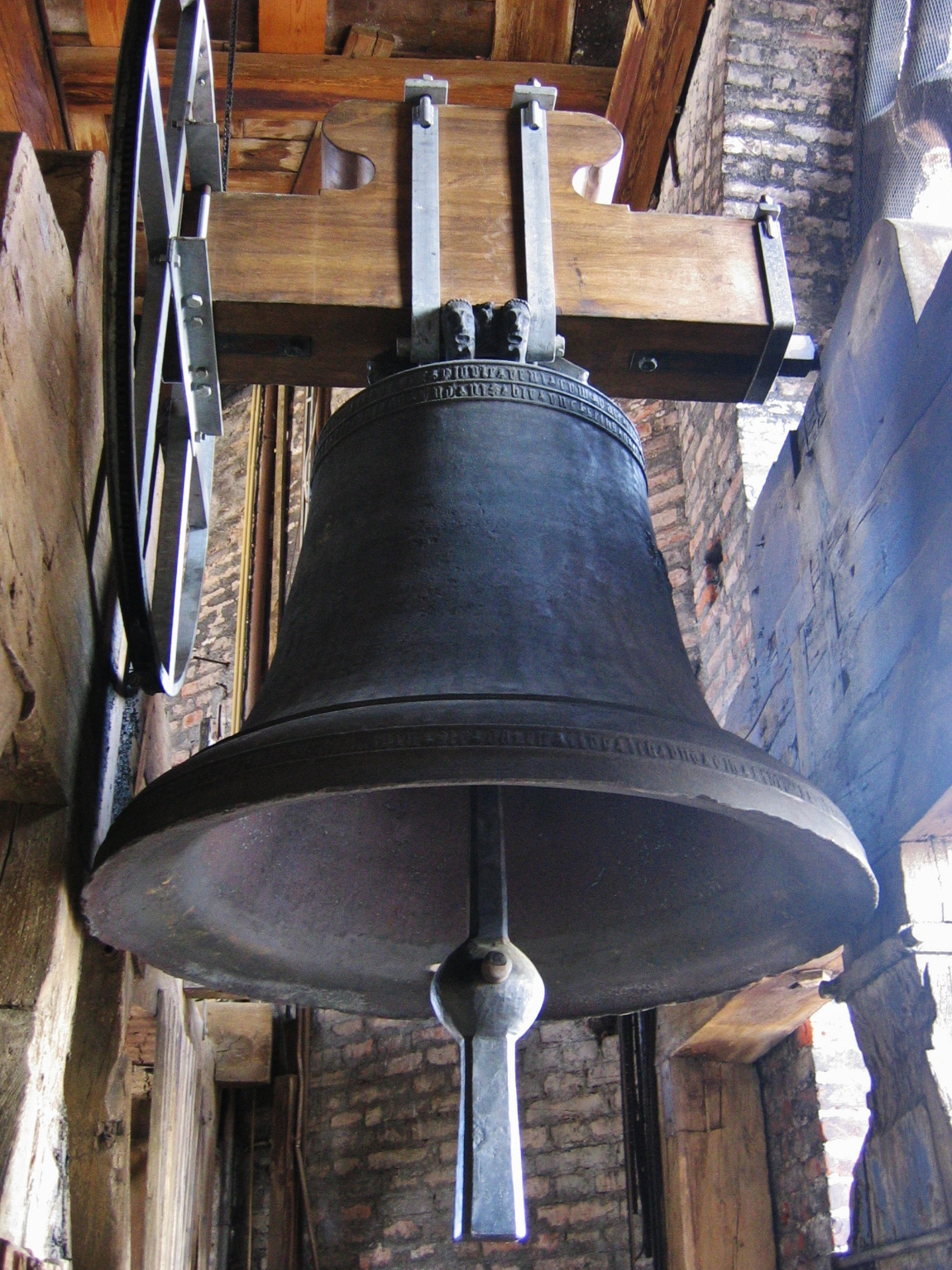 Winklerin im Dom zu München.